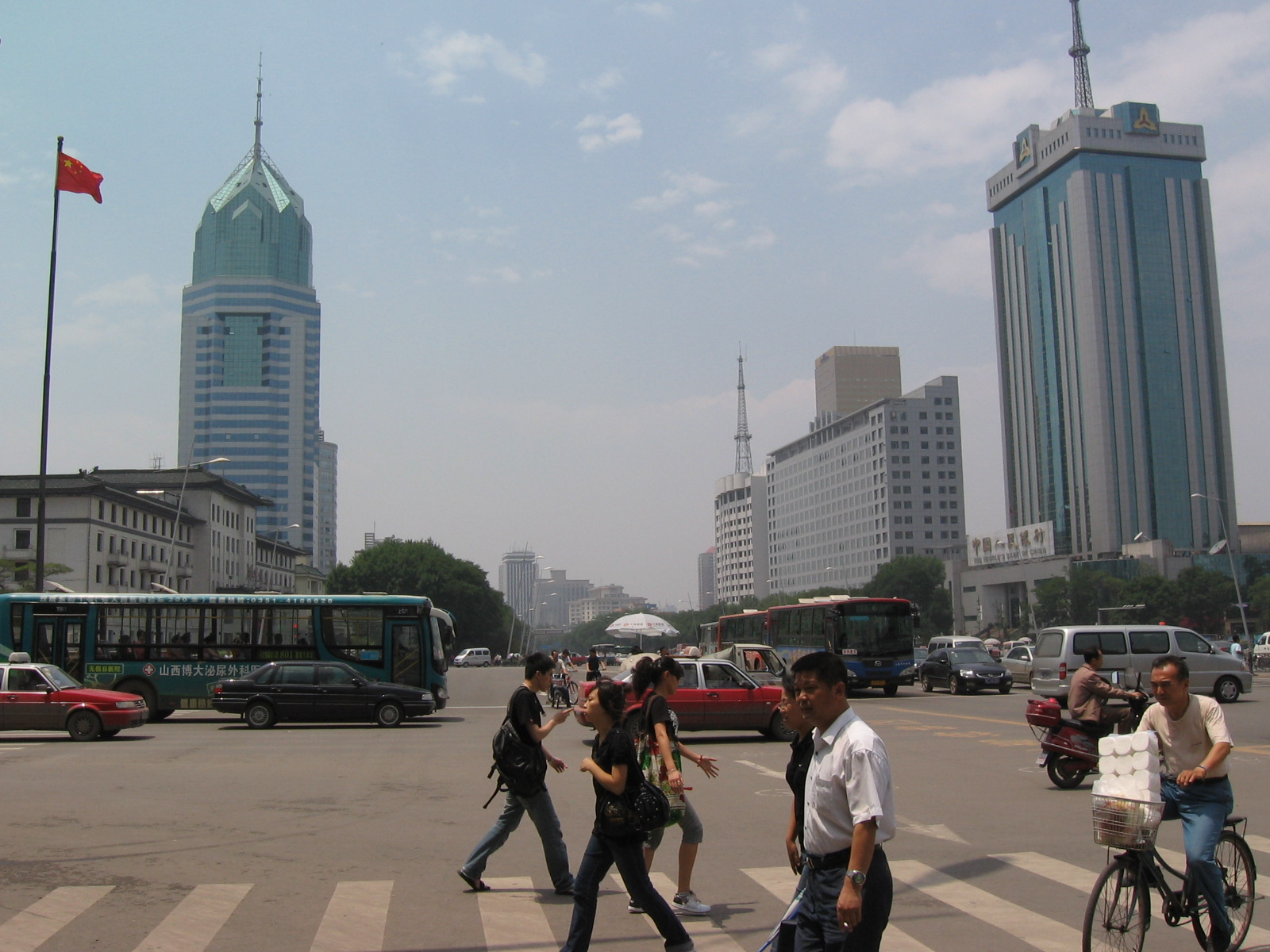 Avenue in Taiyuan